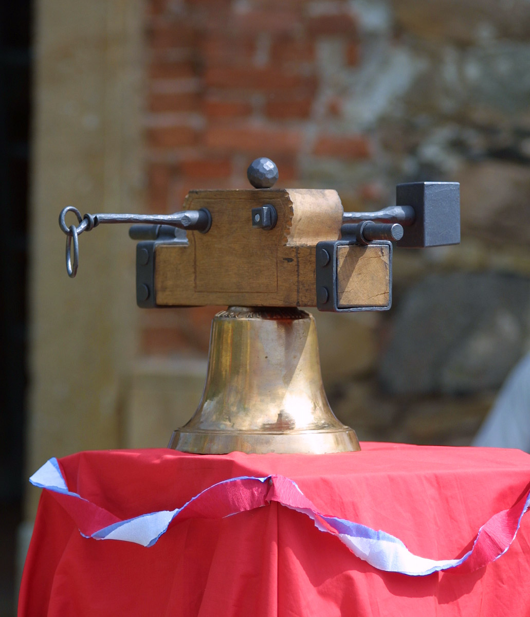 Zvon kostele sv. Petra a Pavla v Dolanech při slavnostním usazení.